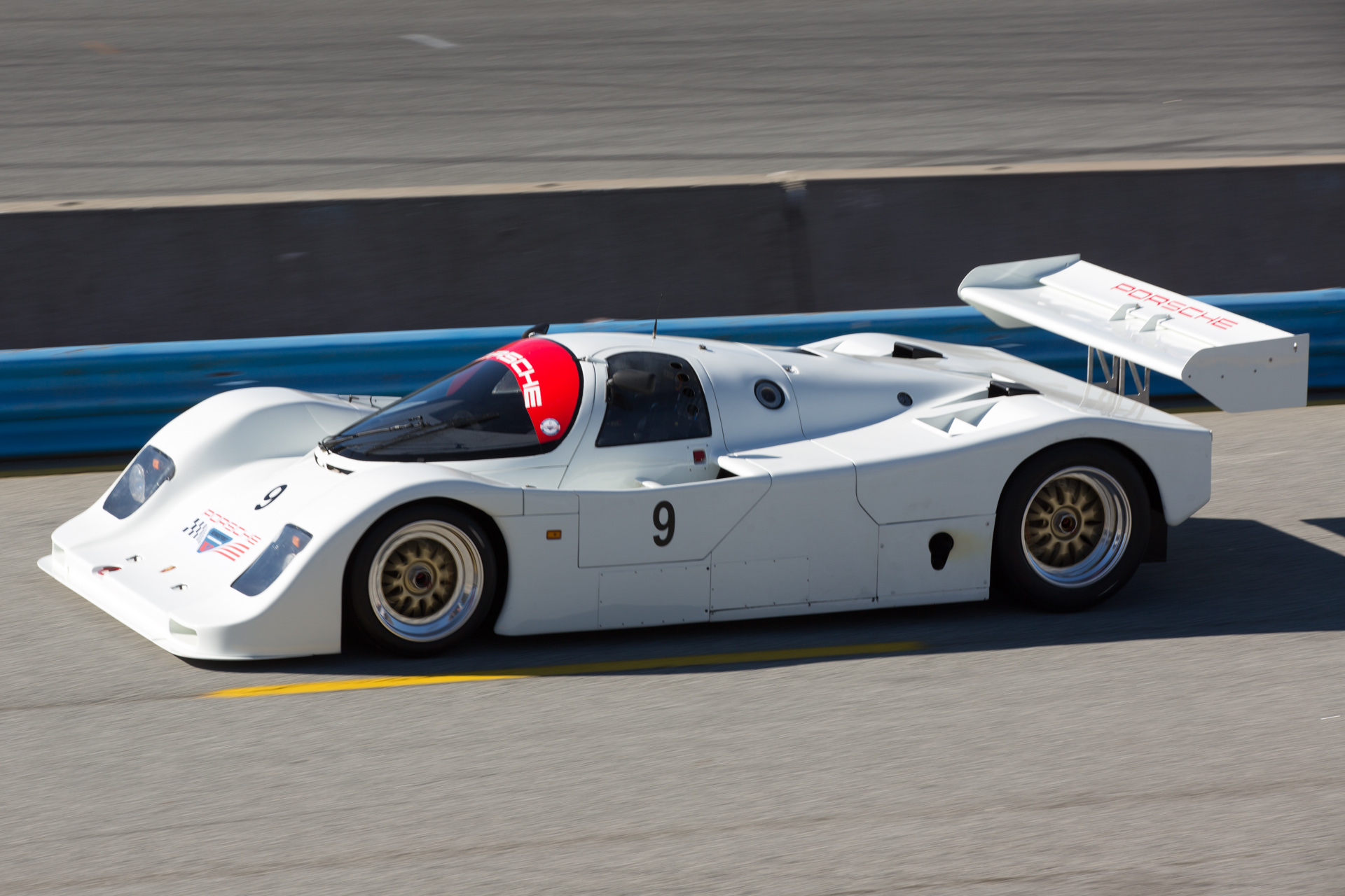 Rennsport Reunion V